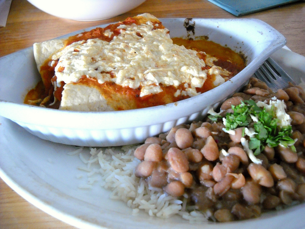 Vegan Enchiladas at Bandidas in Vancouver, BC, Canada ~ ~